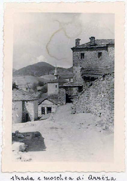 Arrëza, 2 Maj 1941